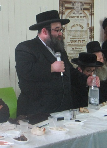 הרב חיים צבי טייטלבוים שליט"א אב"ד ור"מ סאטמאר - ירושלים